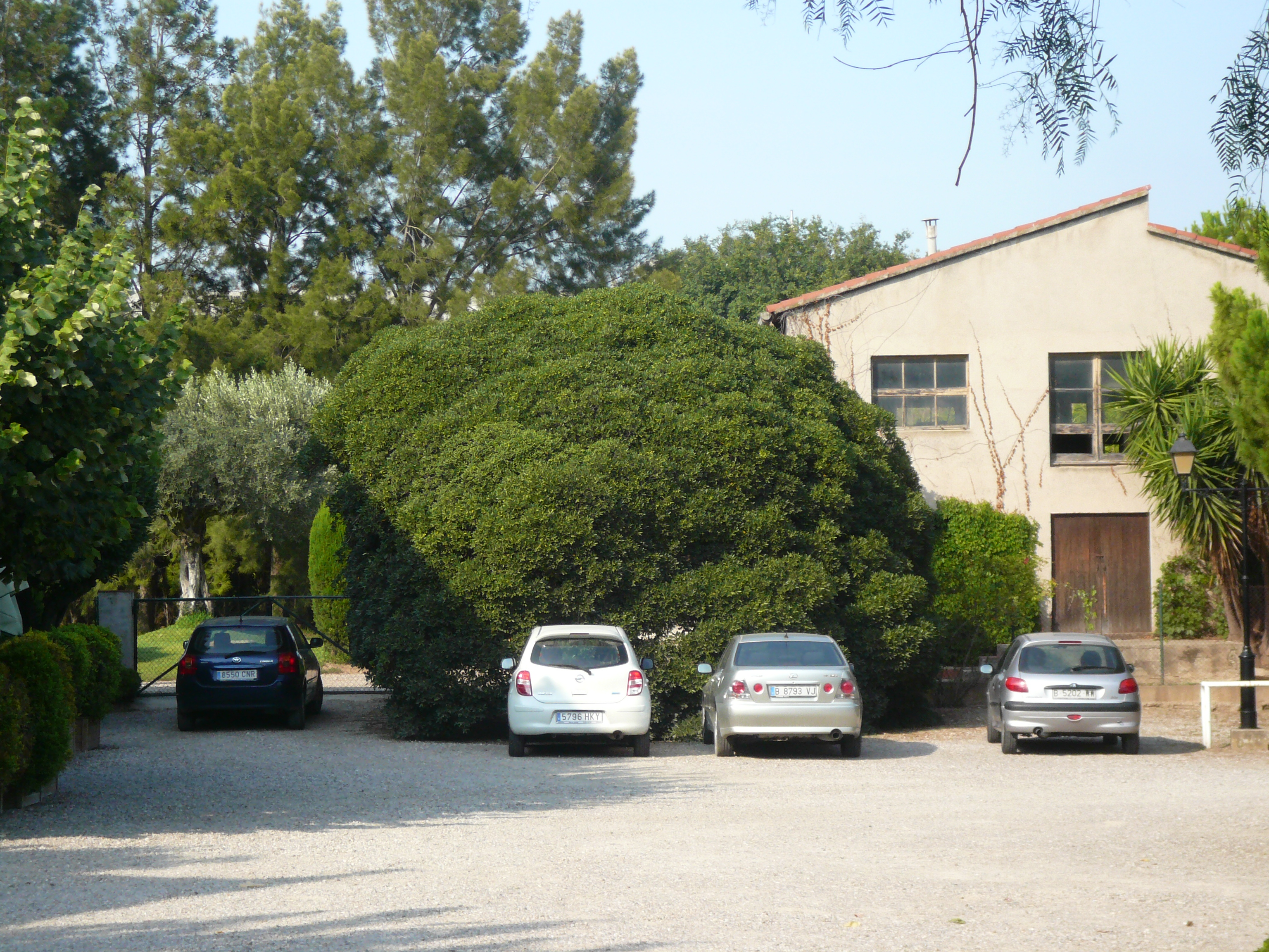 Pitòspor de Can Pau Torrents (Baix Llobregat) (Sant Joan Despí). Pittosporum sp.. Exòtica. This is a a photo of a protected or outstanding tree in Catalonia, Spain, with id: MA-11.217.36 Object location41° 22′ 15.74″ N, 2° 03′ 13.1″ E